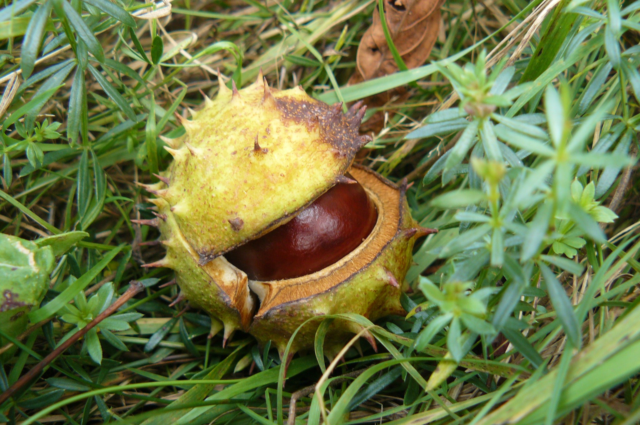 Kasztan koło Grzybna.